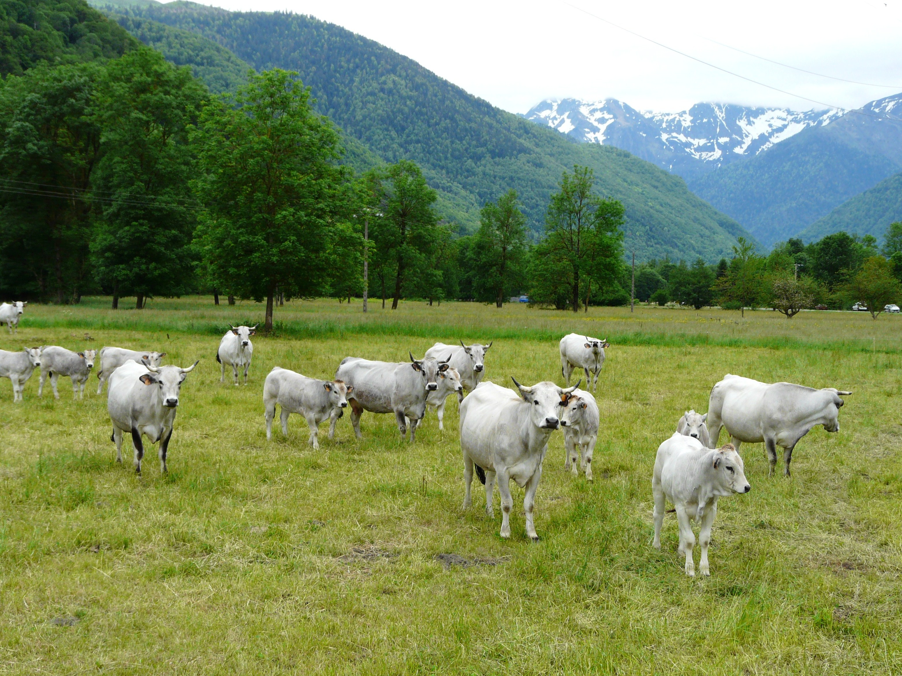 Vaches de la race gasconne à Antignac, Haute-Garonne, France.